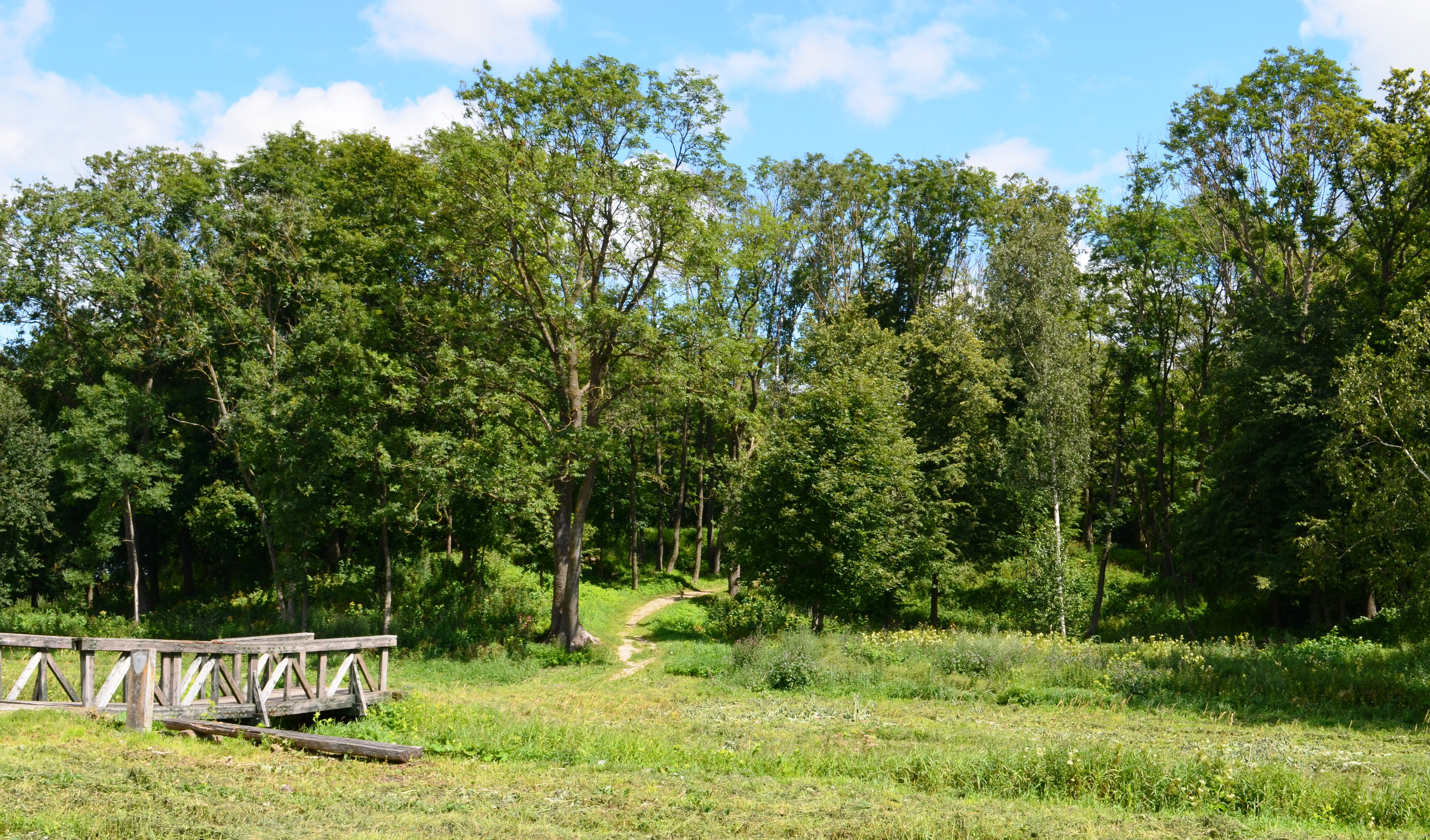 Čičinsko kalnas, Upytė, Panevėžio raj.